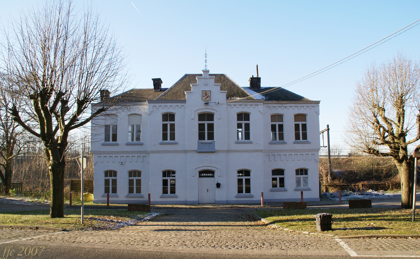 Antiga estació d'Argenteau a la línia Lieja-Maastricht - Ancienne gare SNCB sur la ligne Liège Maastricht